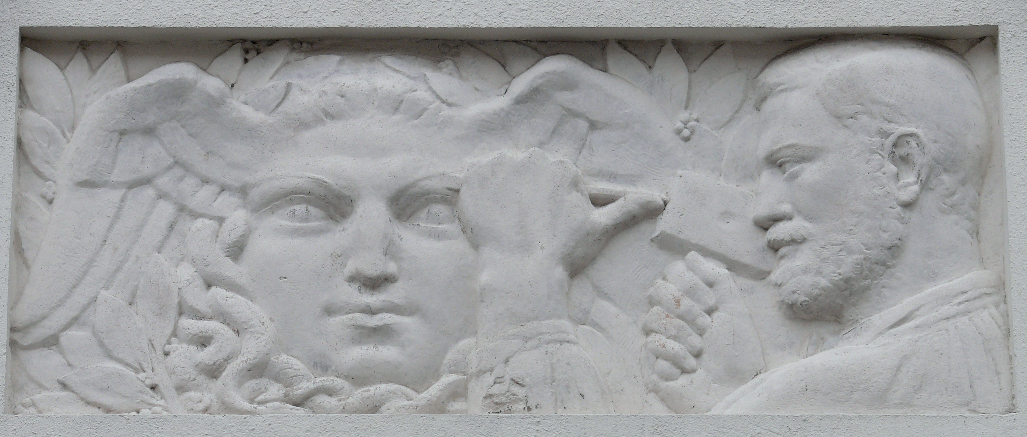 Paris 18ème arrondissement - Hôtel Lejeune, détail rue Simon-Dereure